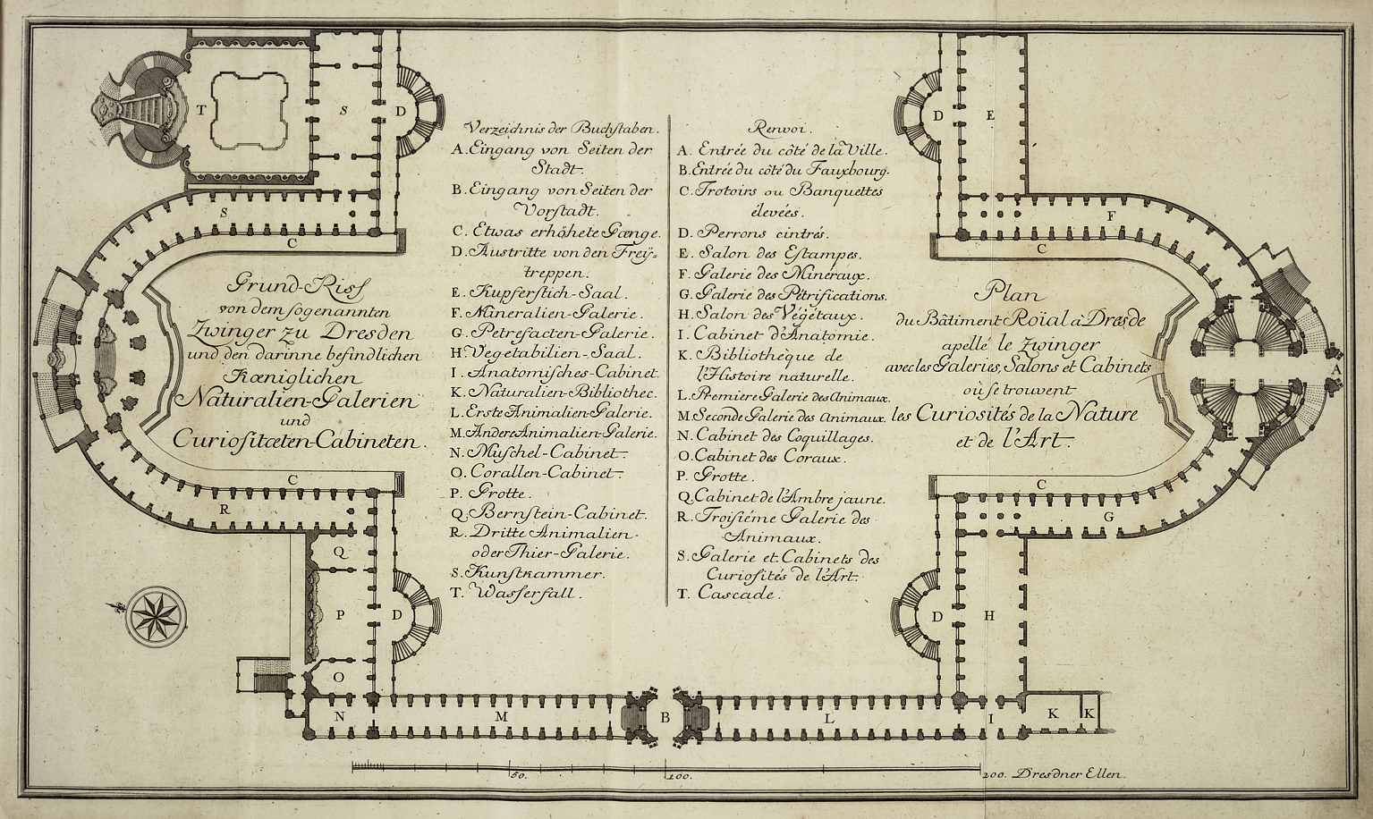 Grundriss des Zwingers mit den dort untergebrachten Naturalien-Galerien und Curiositäten-Cabineten